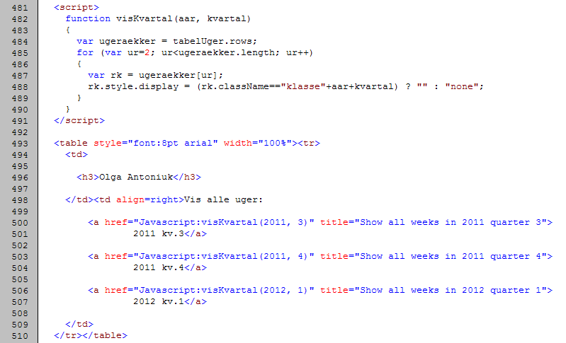 Javascript i en HTML-fil